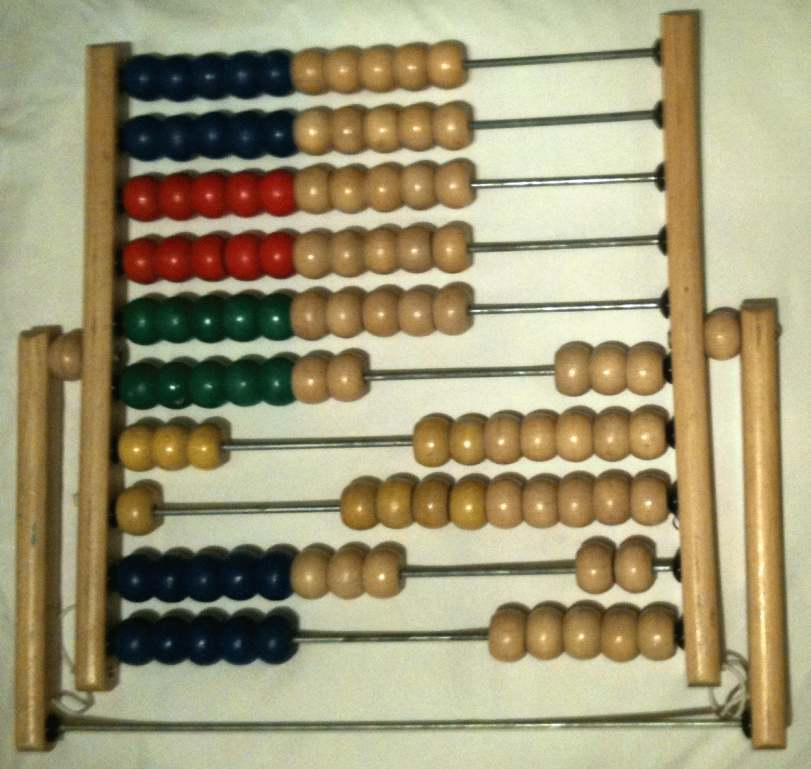 boulier écolier